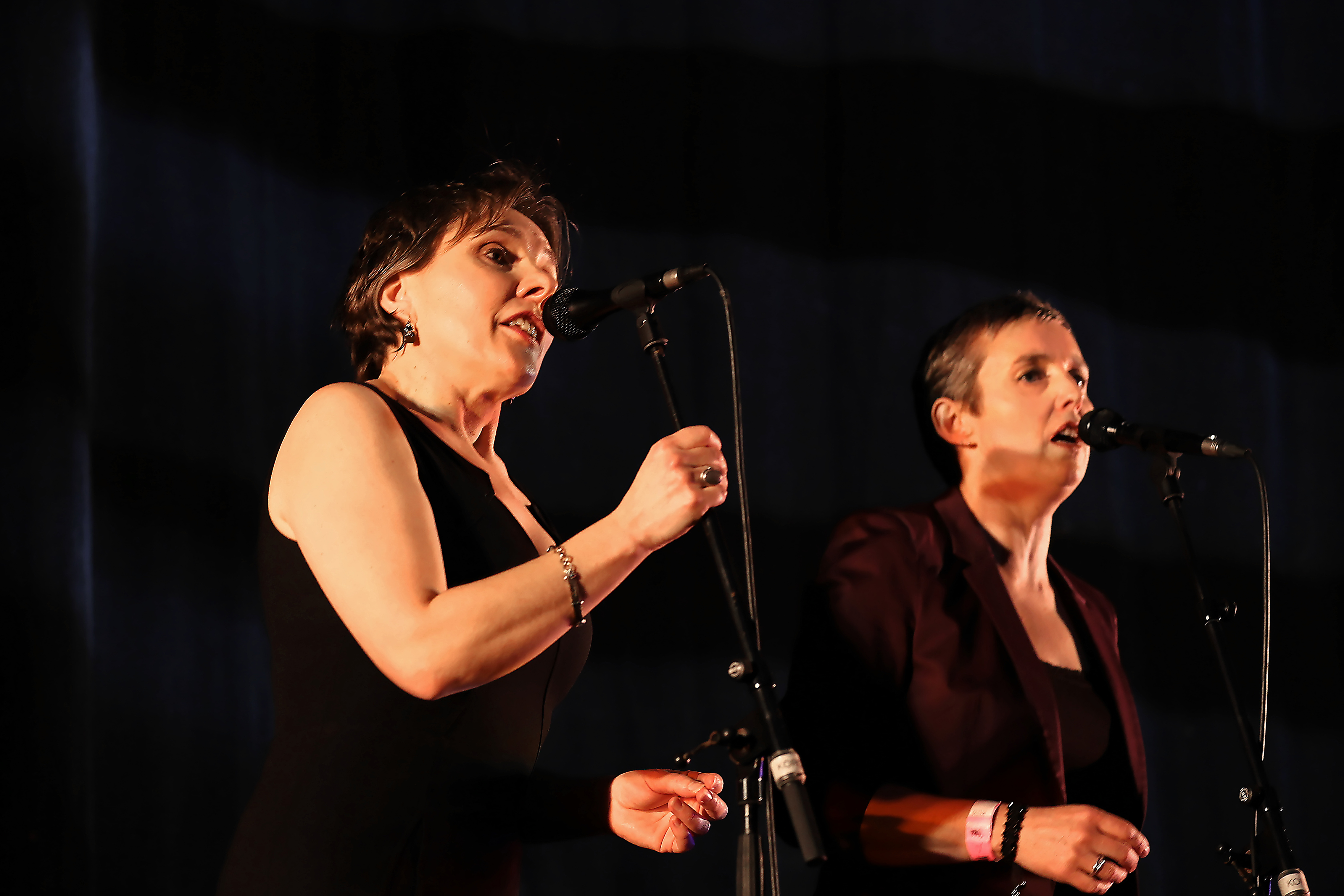 Annie Ebrel et Nolùen Le Buhé en fest-noz lors du festival Yaouank le 21 novembre 2015 au Parc des Expositions de Rennes.